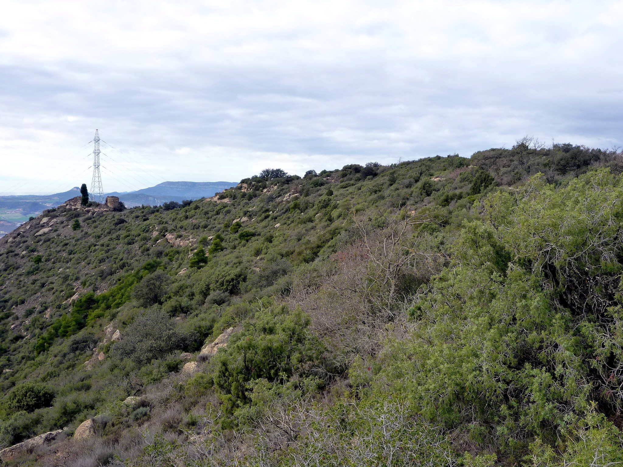 El Puig de Grialó, a la dreta, i el castell a l'esquerra (Artesa de Segre - Noguera)